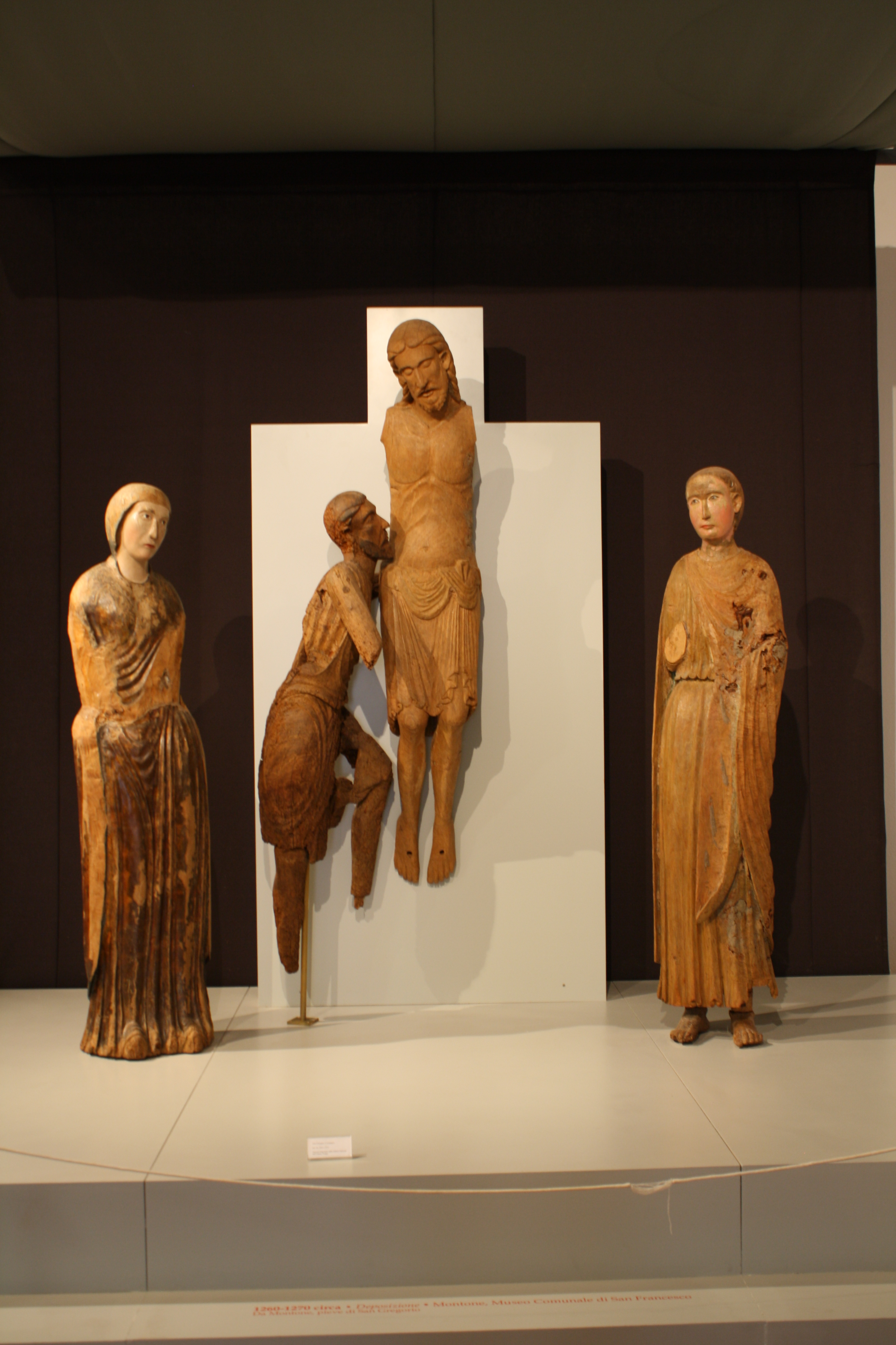 Gruppo ligneo di Deposizione